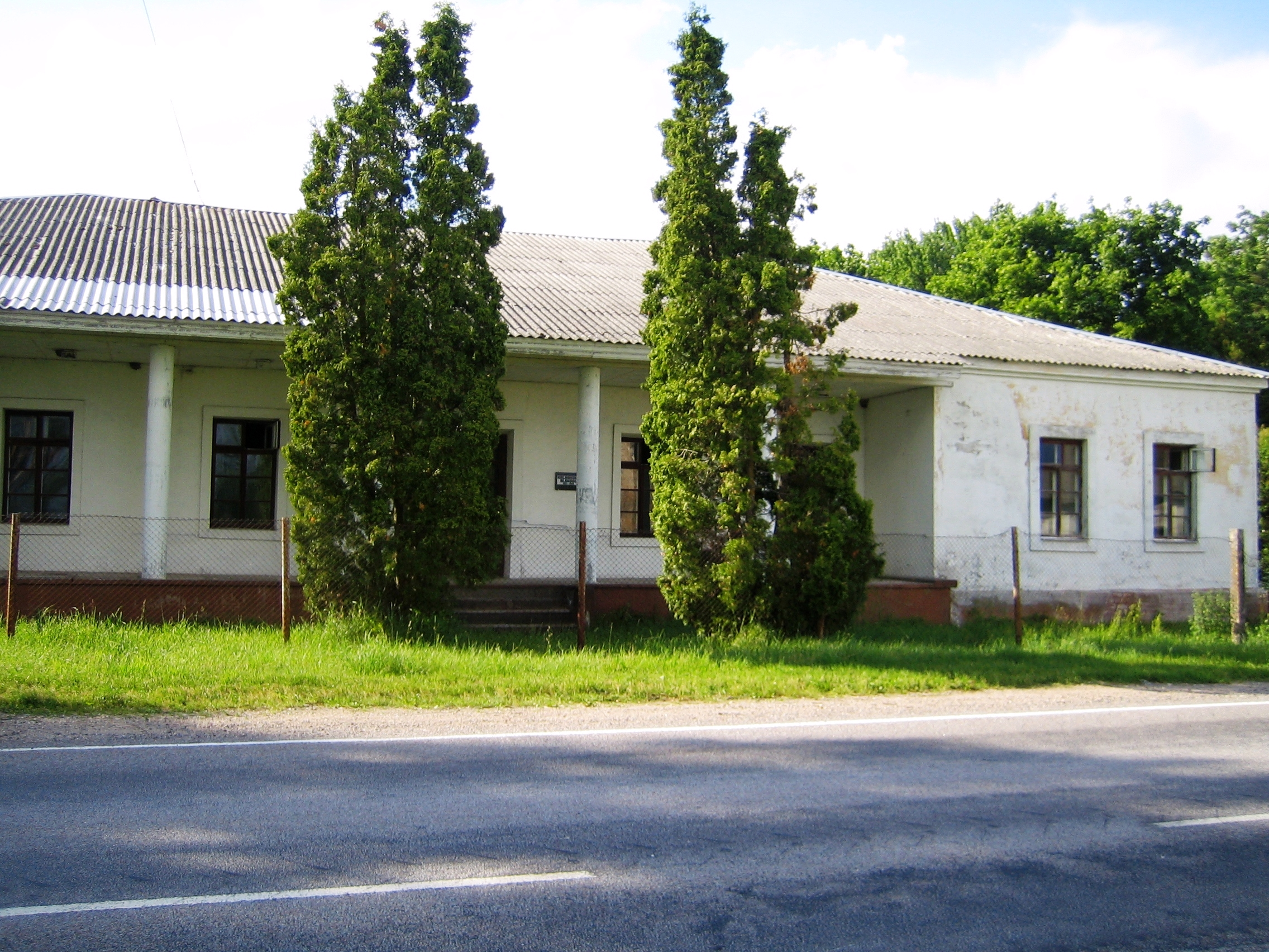 Ninasi Hobupostijaam (1824)